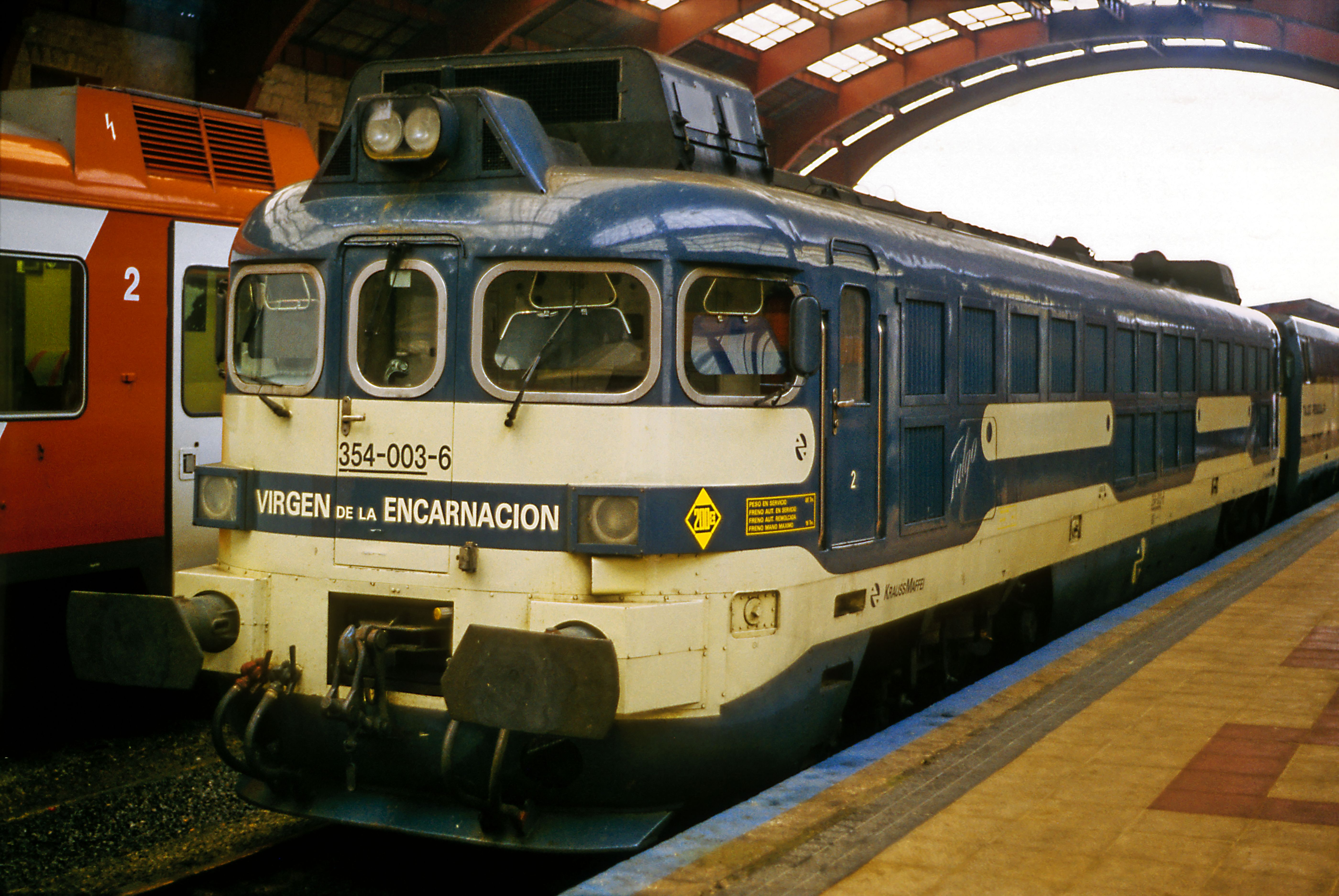 Talgolok von Maffei für Talgo Pendular. Deshalb keine Scharfenbergkupplung, aber 200km/h zulässige Geschwindigkeit